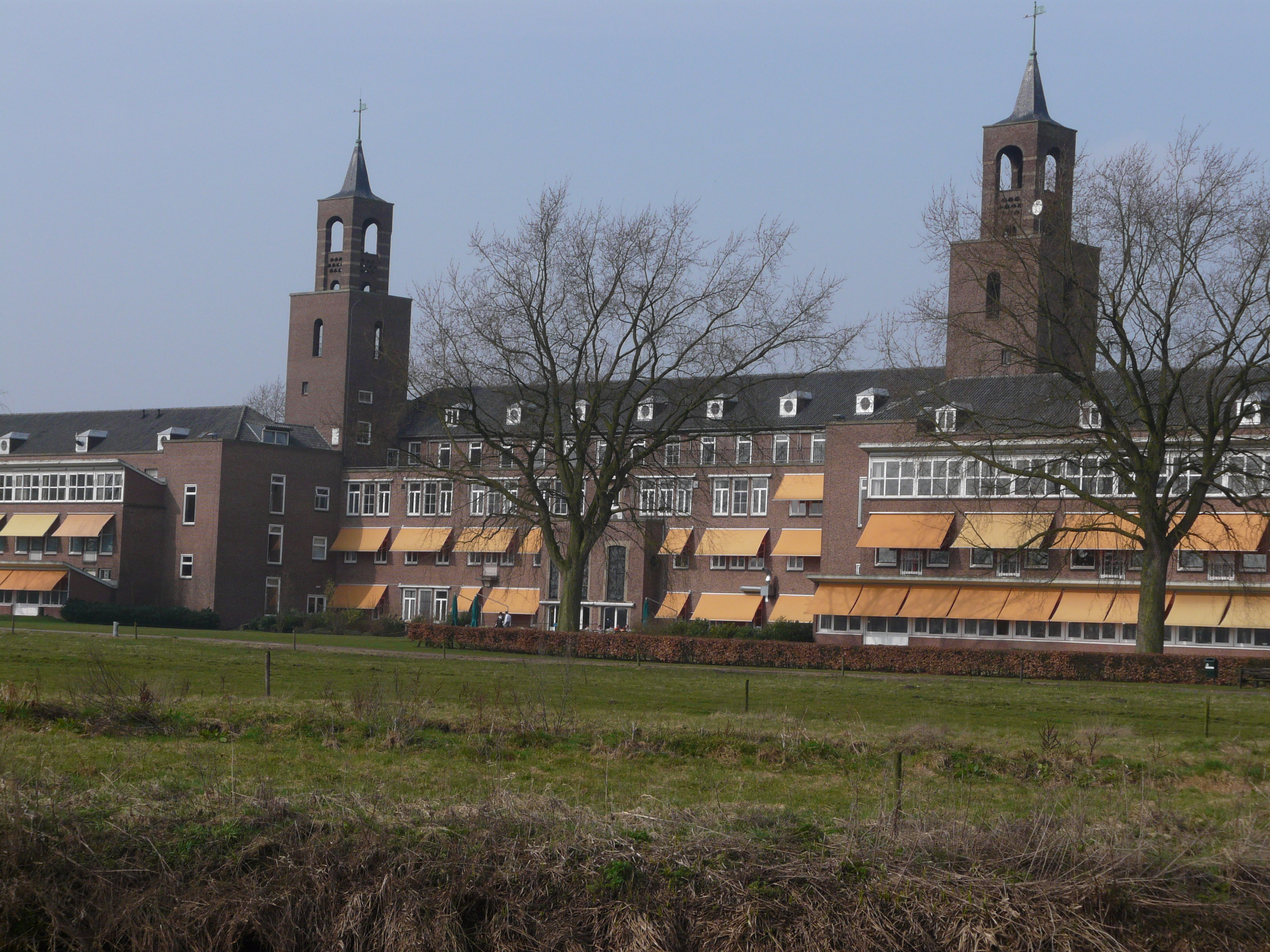 Zicht op een deel van het voormalige Medisch Centrum de Klokkenberg, Galderseweg 81, 4836 AE Breda. Gezien vanuit het Markdal